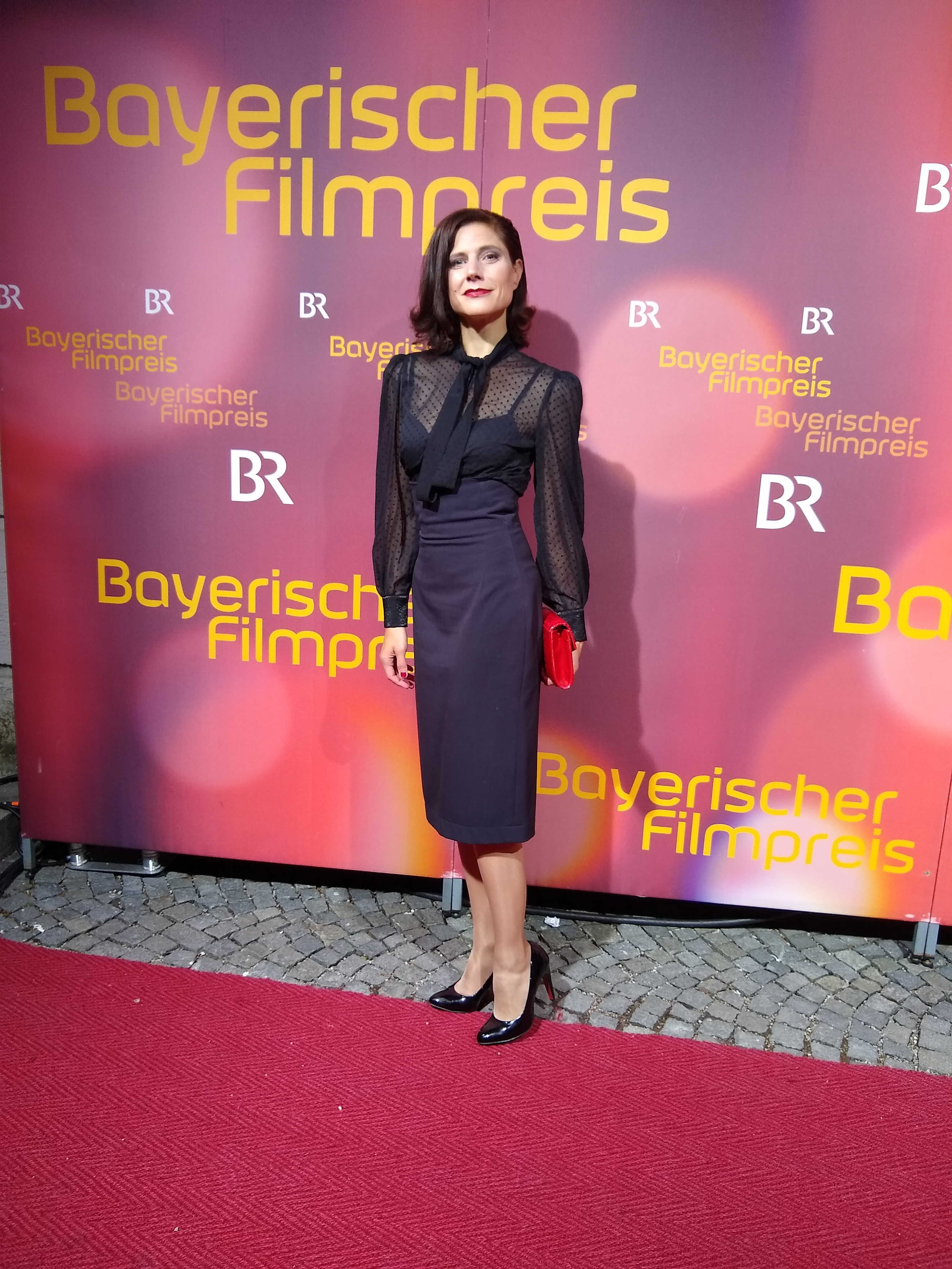 Iris Boss bei der Verleihung des Bayerischen Filmpreises 2019